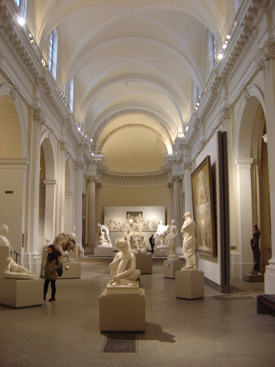 Musée des Beaux-Arts de Lyon. Sculptures du XIXe siècle.